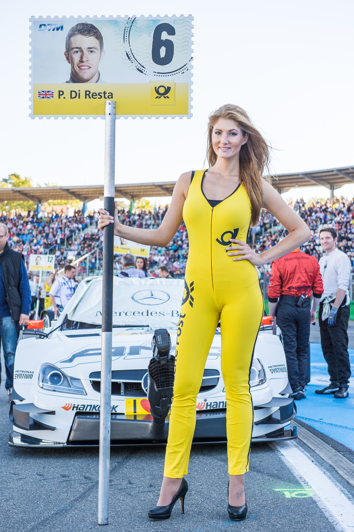 DTM,Deutsche Tourenwagen Masters,Gridgirl,HWA AG,Hockenheimring,Mercedes AMG C-Coupe,Motorsport,Paul Di Resta